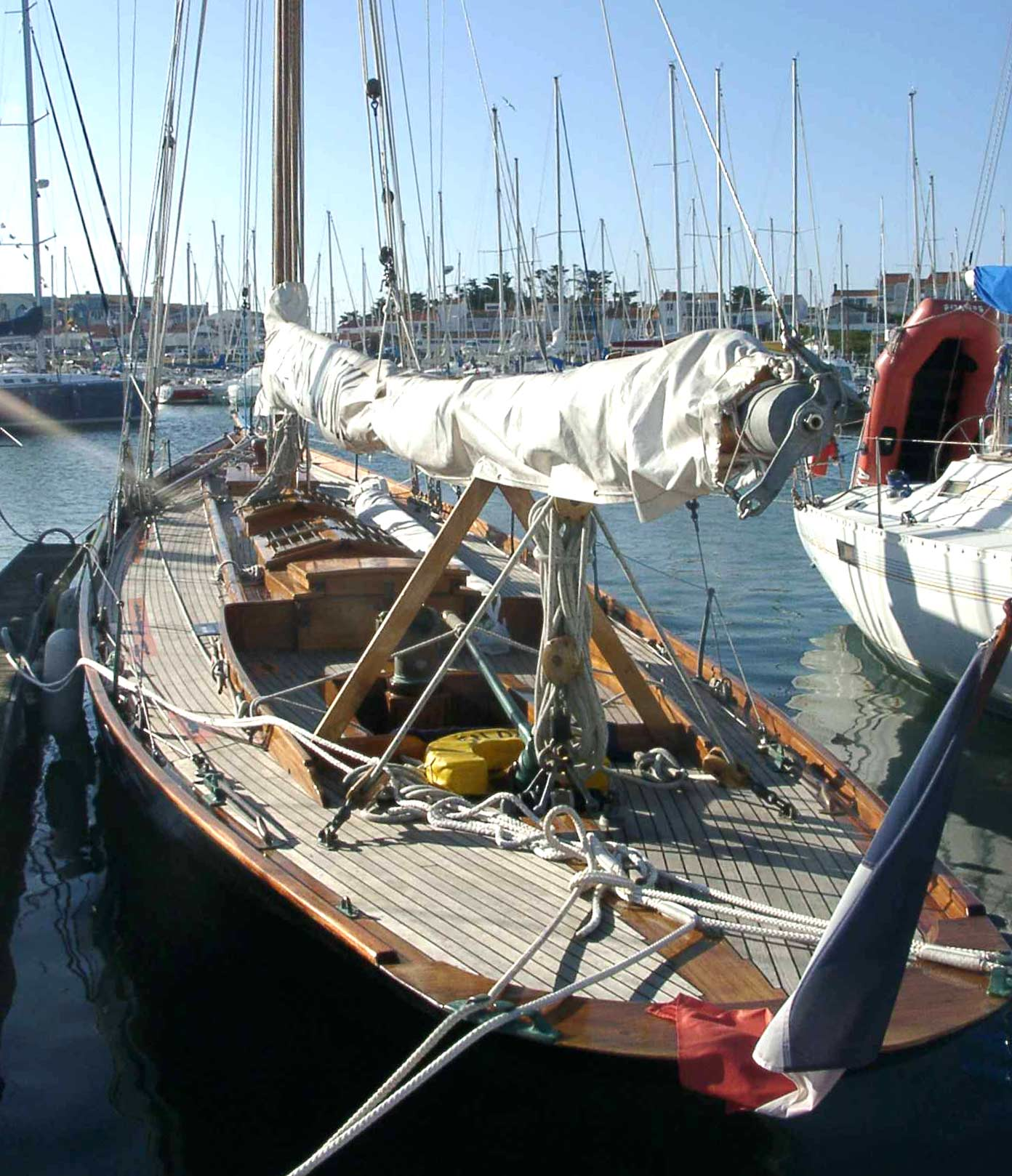 Pen Duick I à l'Herbaudière en 2003 Lieu : L'herbaudière, Ile de Noirmoutier, France Date : 2003 Author : Pline photo ou réalisation (schéma) personnelle